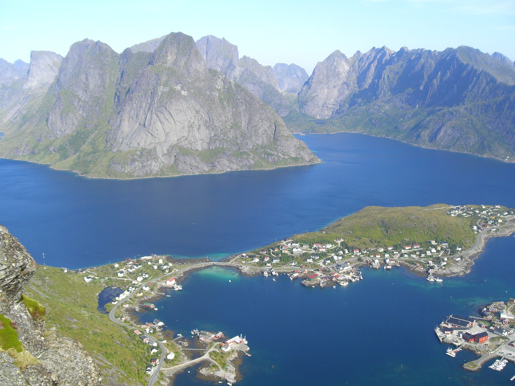 Utsyn frå fjellsida oppom Reine i Moskenes kommune. Reine i framgrunnen. Fjorden som skjer seg oppover til høgre er Vorfjorden, til venstre Kjerkfjorden.